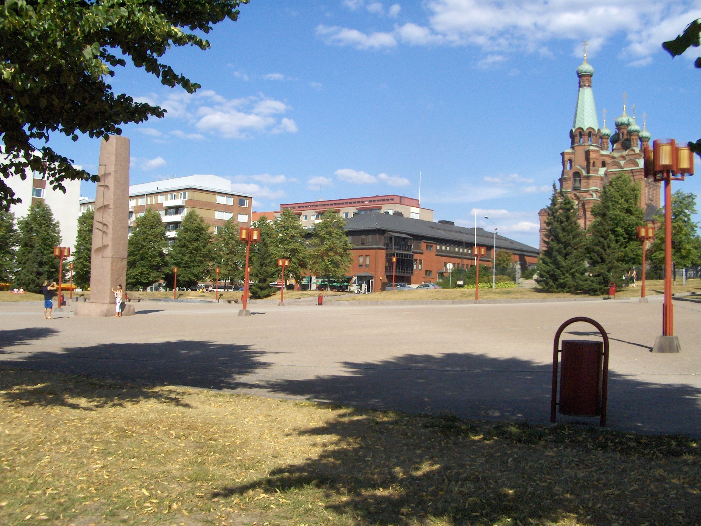 Sori square in Tampere